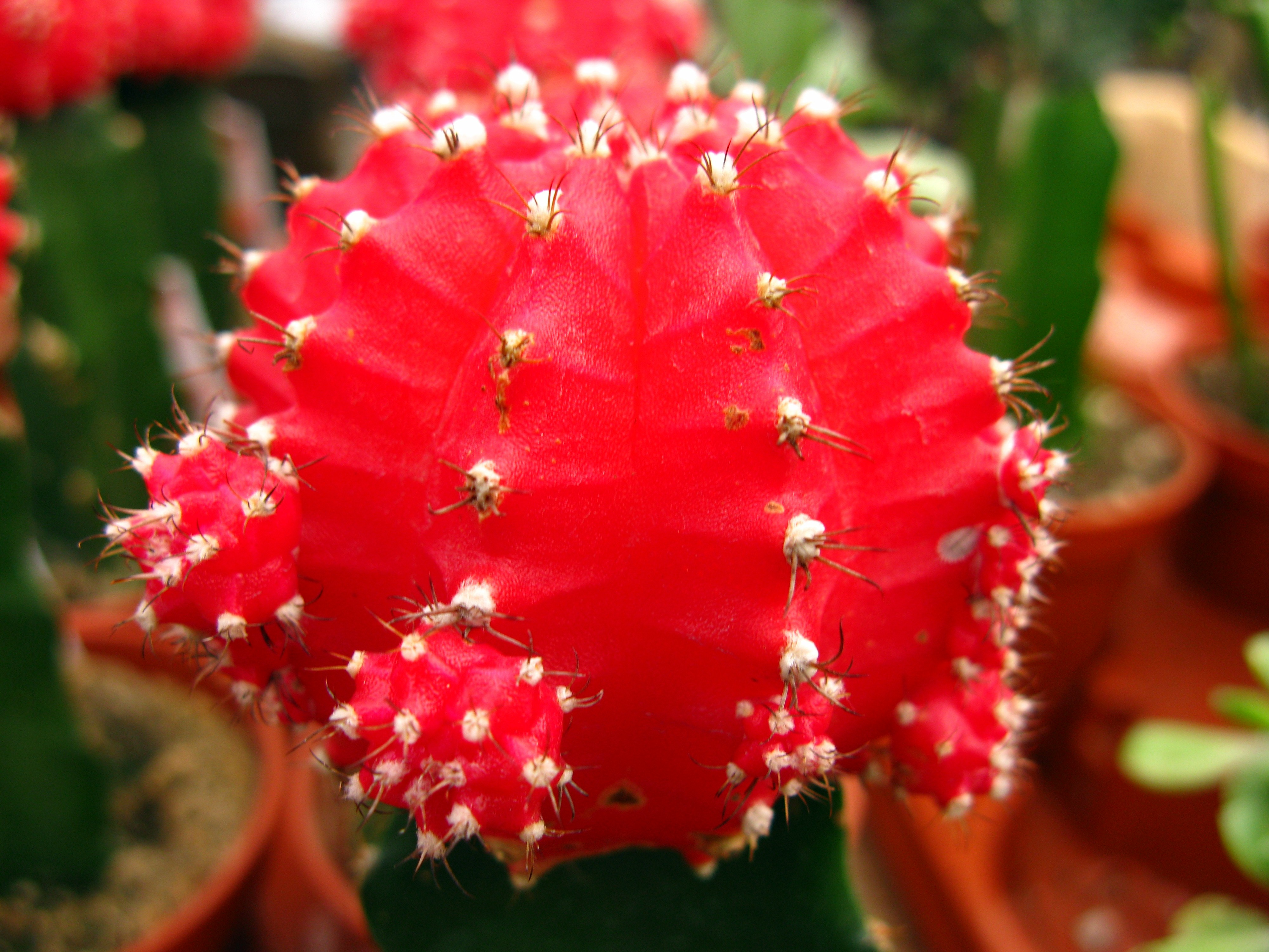 A plant, Altoona, Pennsylvania